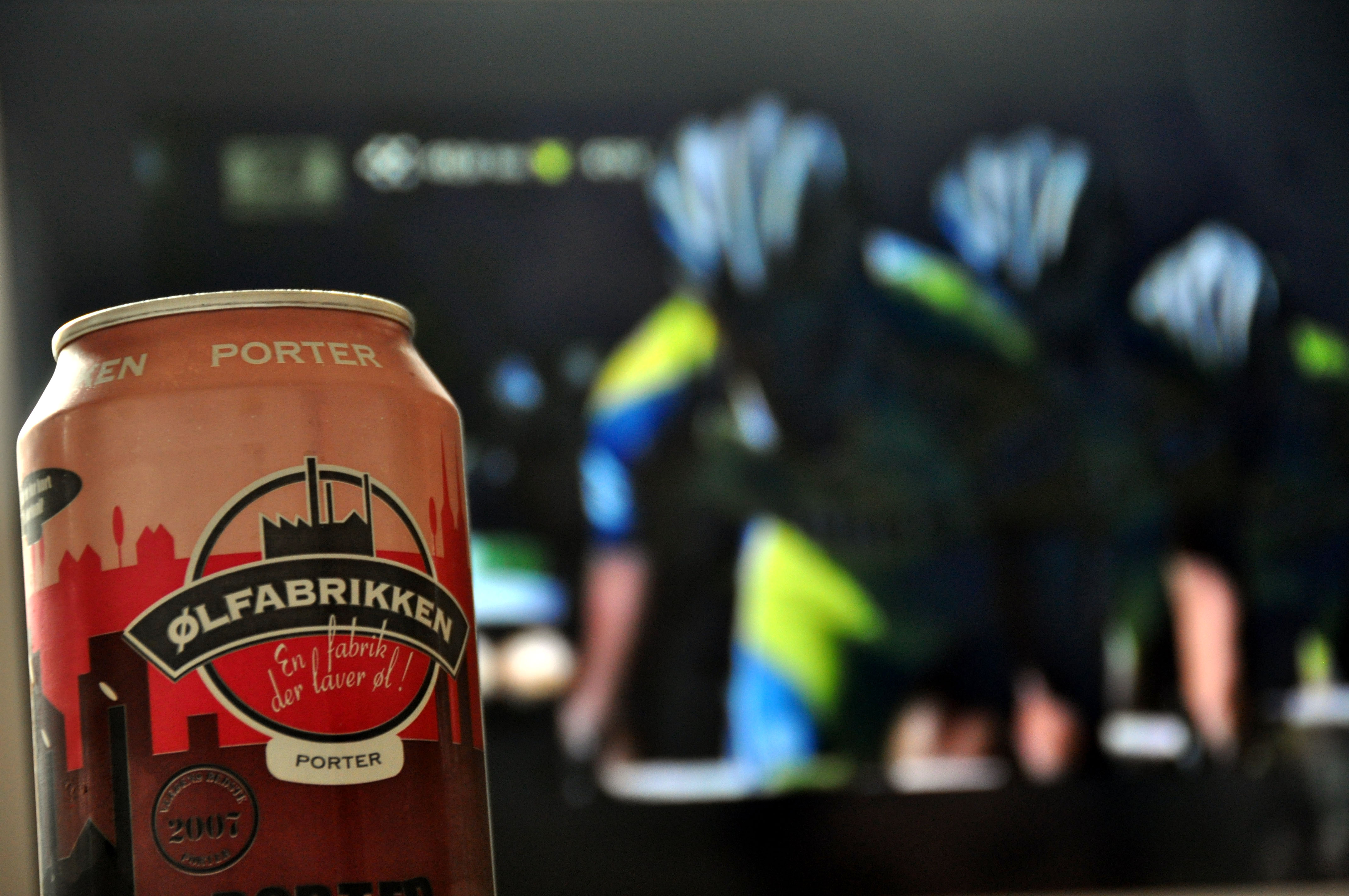 Ølfabrikken Porter